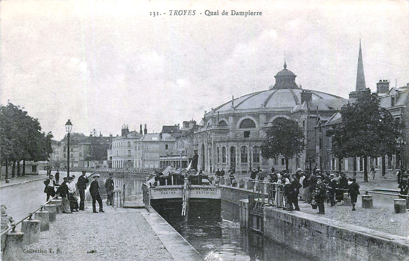 Ecluse de Troyes; écluse disparue du canal de la Haute-Seine. Elle se trouvait quai de Dampierre à Troyes.